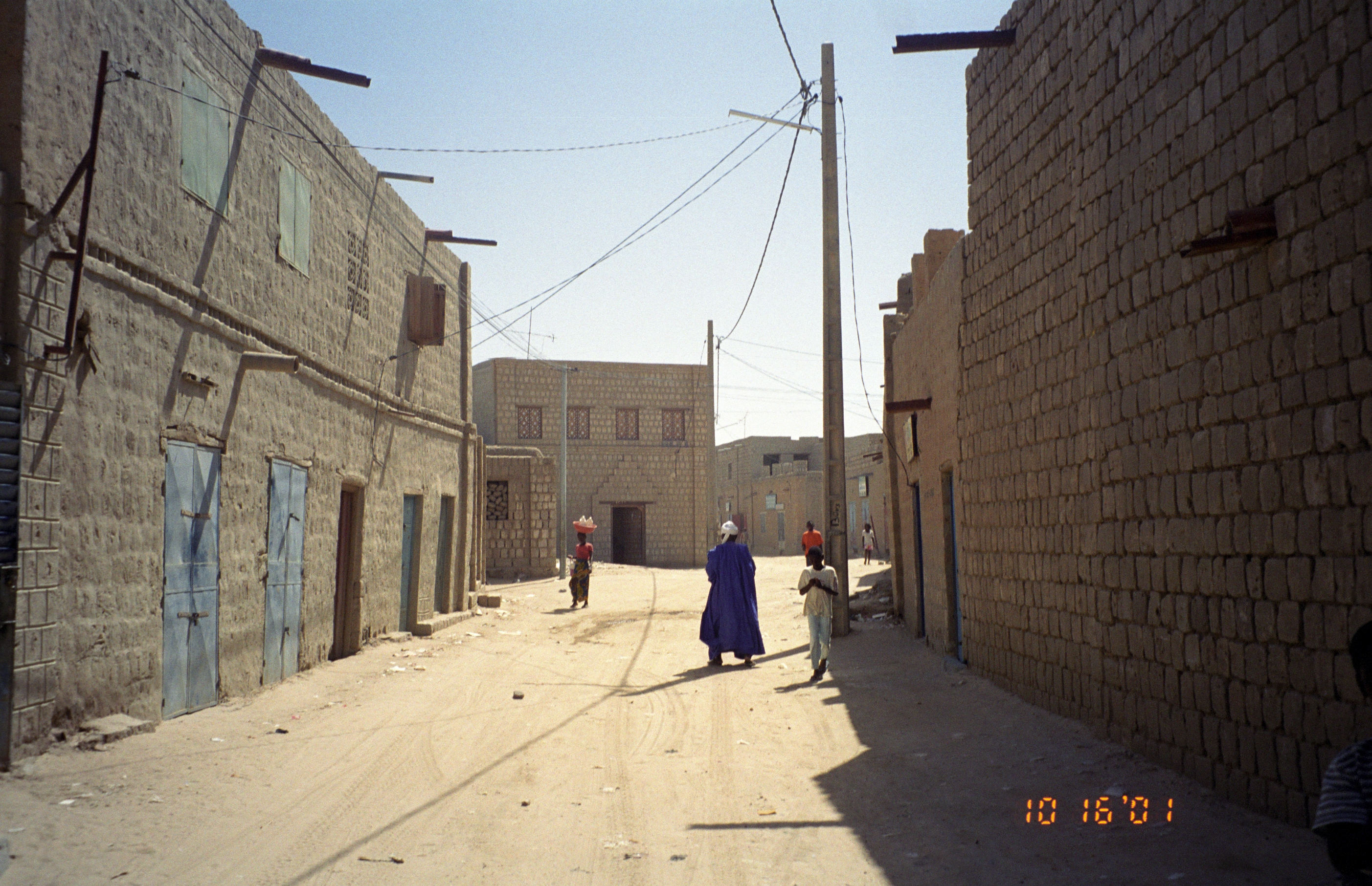 Timbuktu street scene.